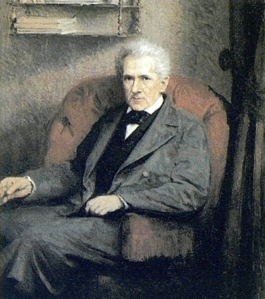 Александр Васильевич Никитенко